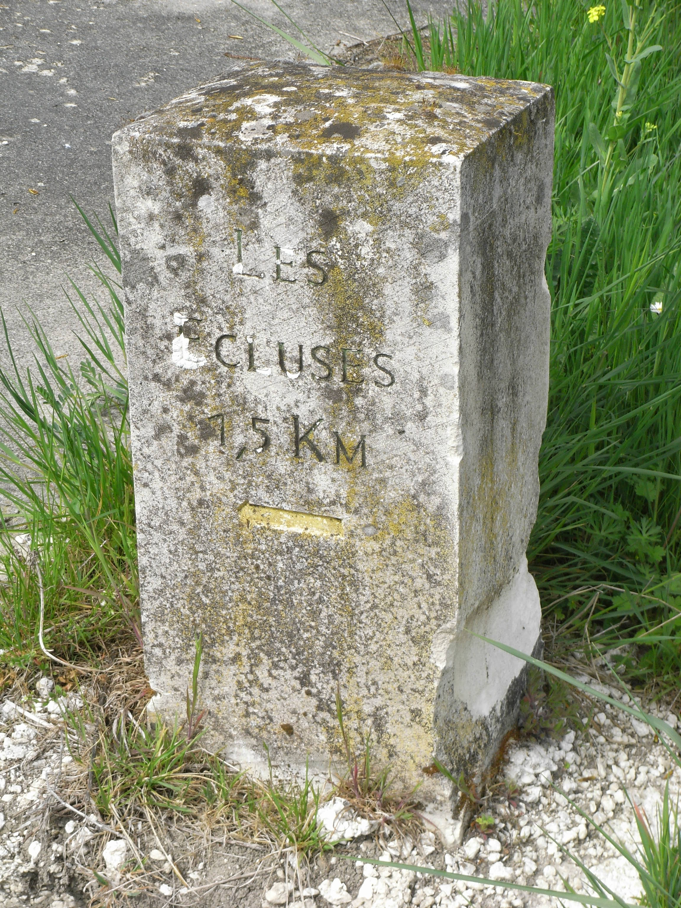 Borne du canal de Brouage (Charente-Maritime en France).